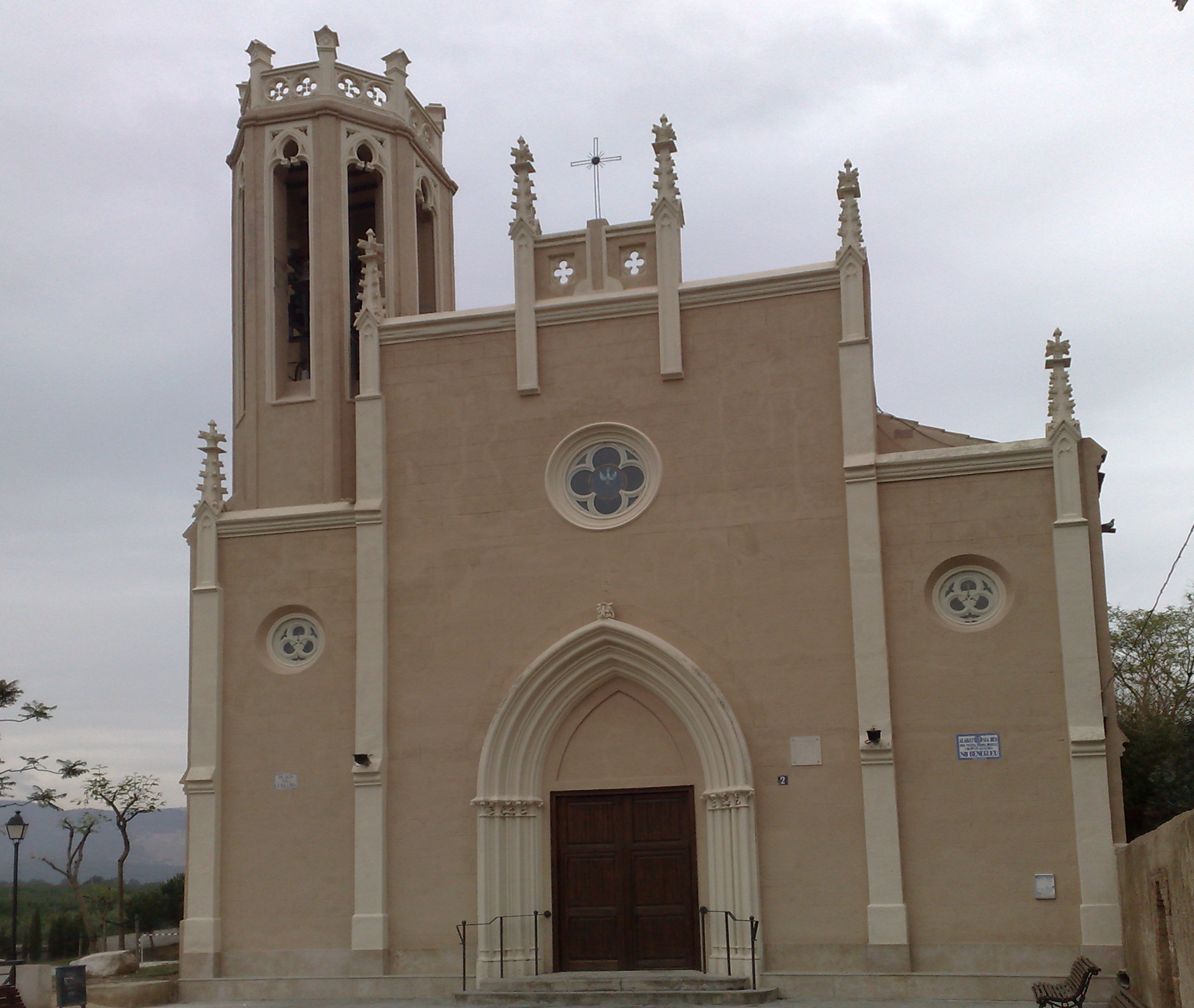 Església parroquial de Santa Úrsula. 1914. El Milà.